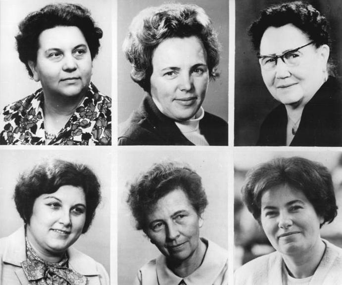 Zentralbild / Hesse-Junge-Krisch 13.6.69 Berlin: 2. Frauenkongreß der DDR Als stellvertretende Vorsitzende des Bundesvorstandes des Demokratischen Frauenbundes Deutschlands wurden auf dem 2. Frauenkongreß der DDR am 13.6.1969 Ursula Friedrich (1.R.l.), stellvertretender Verlagsleiter des Union-Verlages Dresden; Else Merke (1.R.M.), Mitglied des Staatsrates der DDR und LPG-Bäuerin; Wilhelmine Schirmer-Pröscher (1.R.r.), Mitglied des Präsidiums der Volkskammer DDR; Gisela Queck (2.R.l.), stellvertretende Vorsitzende des Rates des Bezirkes Neubrandenburg; Dr. Hildegard Wachsmuth (2.R.M.), wissenschaftliche Mitarbeiterin an der Akademie der Landwirtschaftswissenschaften, und Dr. Rosemarie Walther (2.R.r.), Dozentin an der Humboldt-Universität Berlin, gewählt. 6-teilige Porträtzusammenstellung